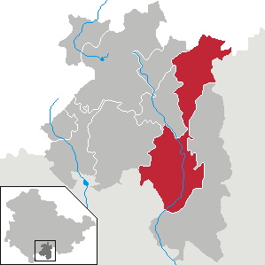 Sonneberg in Thüringen, Landkreis Sonneberg